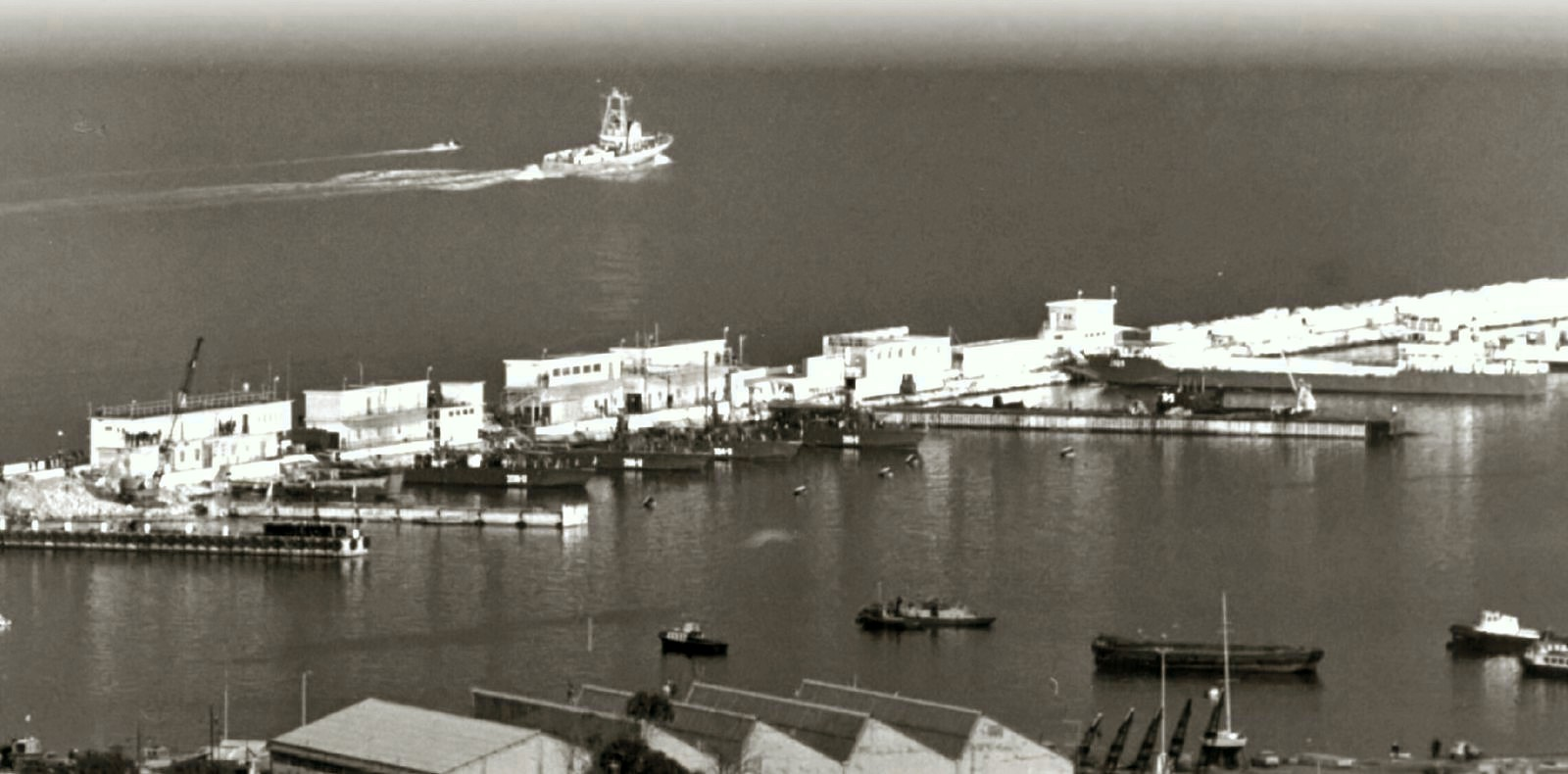 אח"י מבטח הספינה הראשונה שנבנתה בשרבורג מגיעה לנמל חיפה